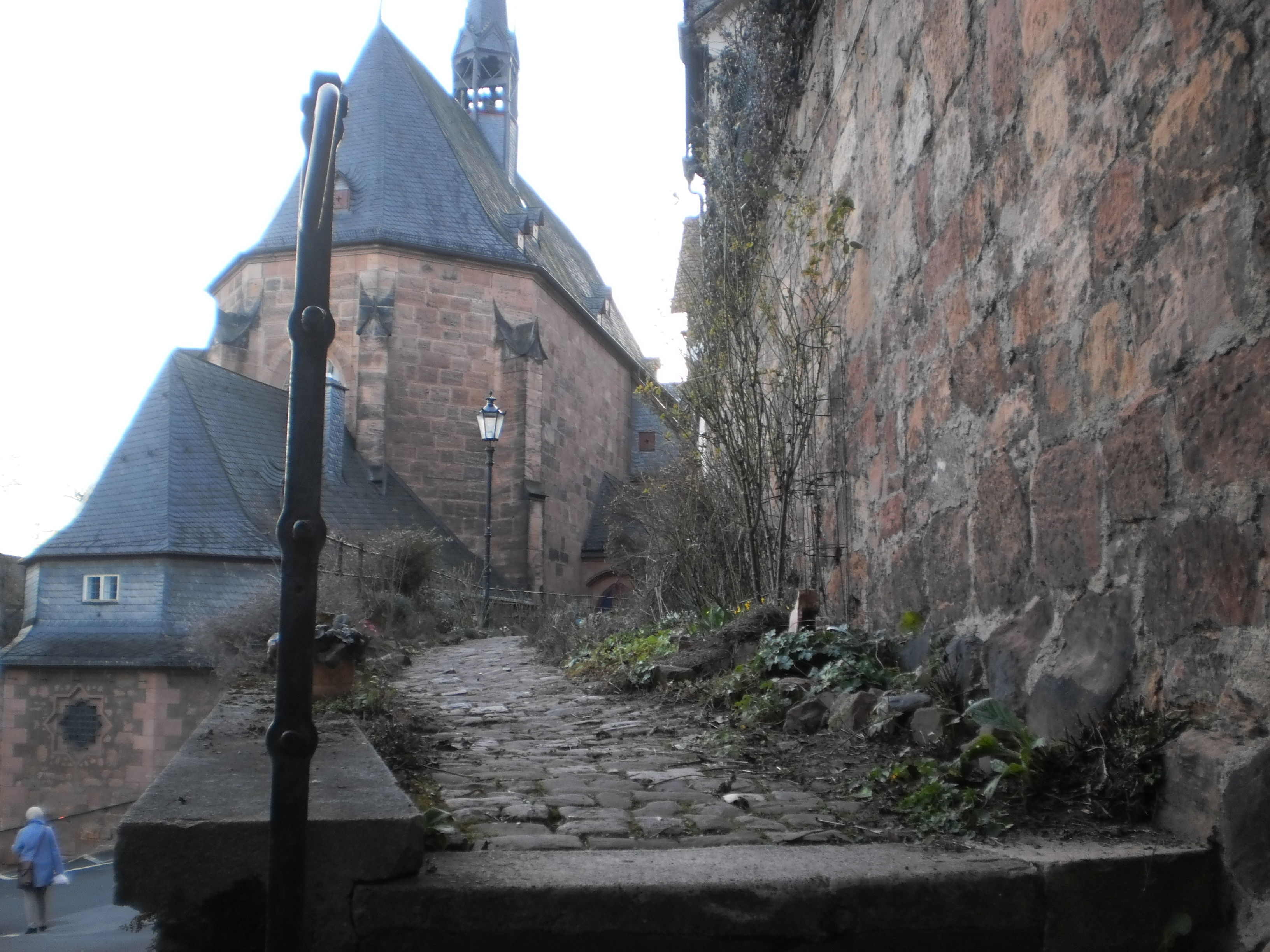 Frisch gepflegter Steingarten (Pocket park) auf einer der Stützmauern oberhalb der Kugelgasse. Vielleicht ein zwischenzeitlich gepflasterter Weingarten mit Ansätzen zur Rekultivierung durch die heutigen Bewohner? In Blickrichtung ist die Kugelkirche Marburg zu sehen, welche am Südhang unterhalb des Landgrafenschlosses als Keimzelle für das mittelalterliche Marburg gilt. Die Kugelgasse führt hier unten vorbei, weiter aufwärts zum Kalbstor. Ein Vergleich mit einem einem Bild aus dem Jahr 1910 von Karl Armbrust (mit altem Kopfsteinpflaster) mag interessant sein.